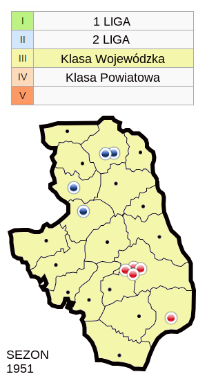 Jagiellonia w sezonie 1951 - mapa klubów